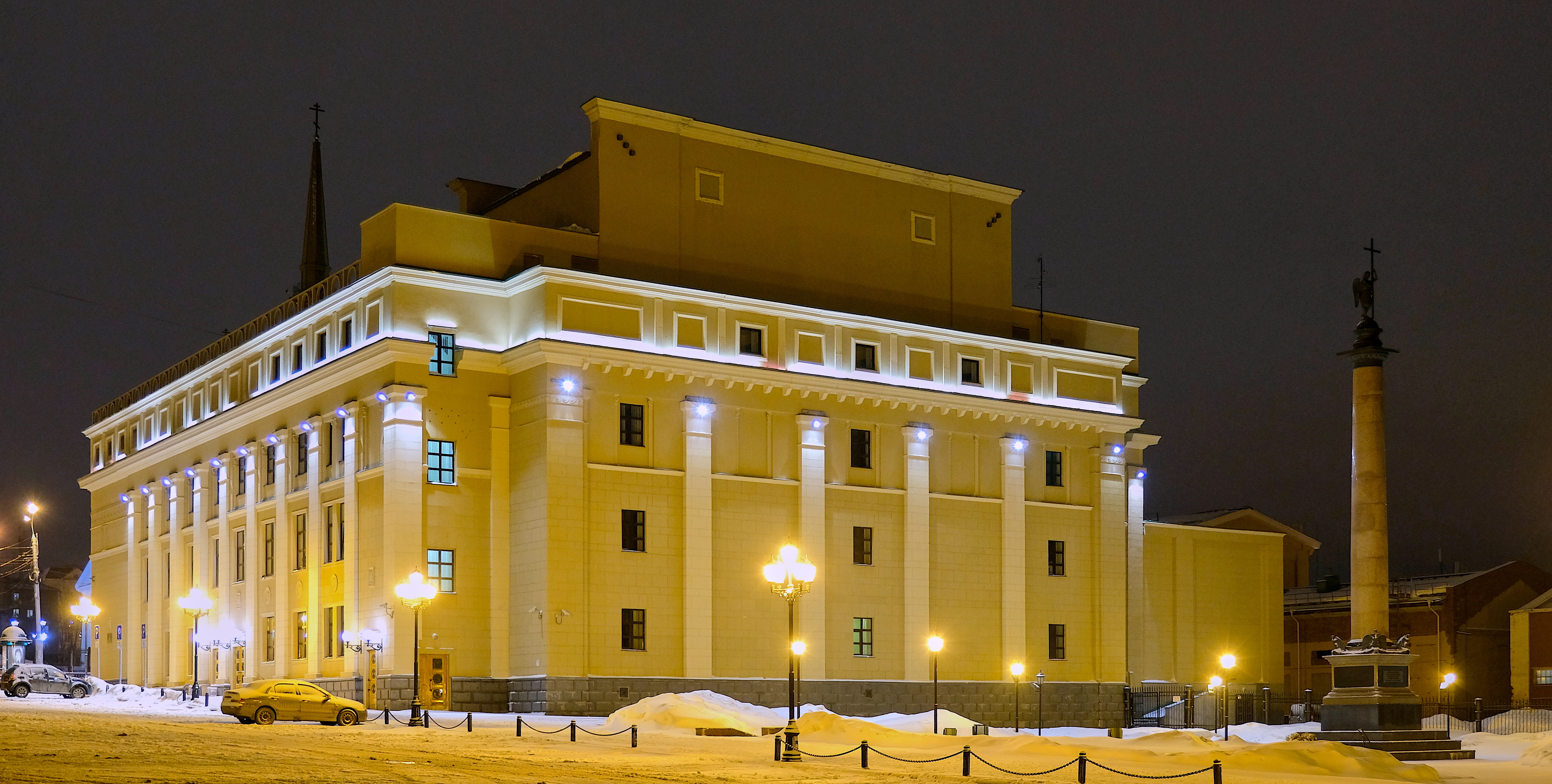 Государственный русский драматический театр Удмуртии ночью (вид на западную стену). Справа видна Михайловская колонна.